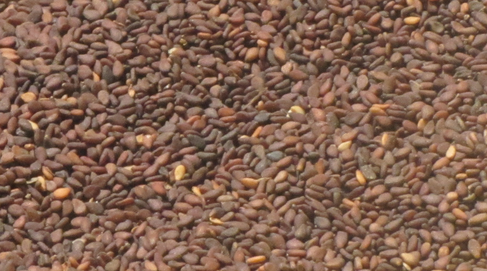 எள், எள்ளு, சங்கநூல் மலைபடுகடாம் இதனை 'எண்' எனக் குறிப்பிடுகிறது.